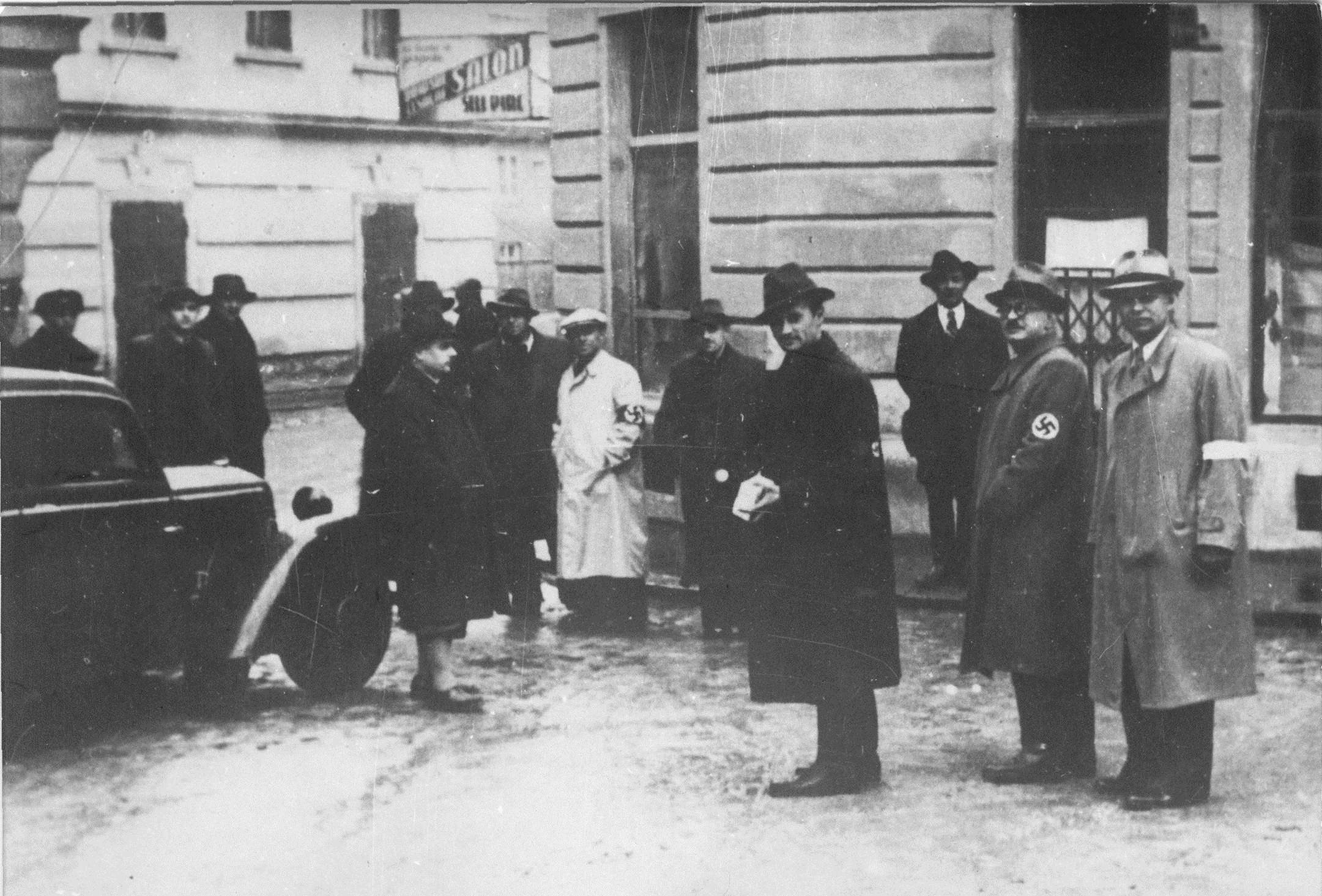 Mariborski kulturbundovci prevzemajo oblast od jugoslovanske policije v Mariboru.